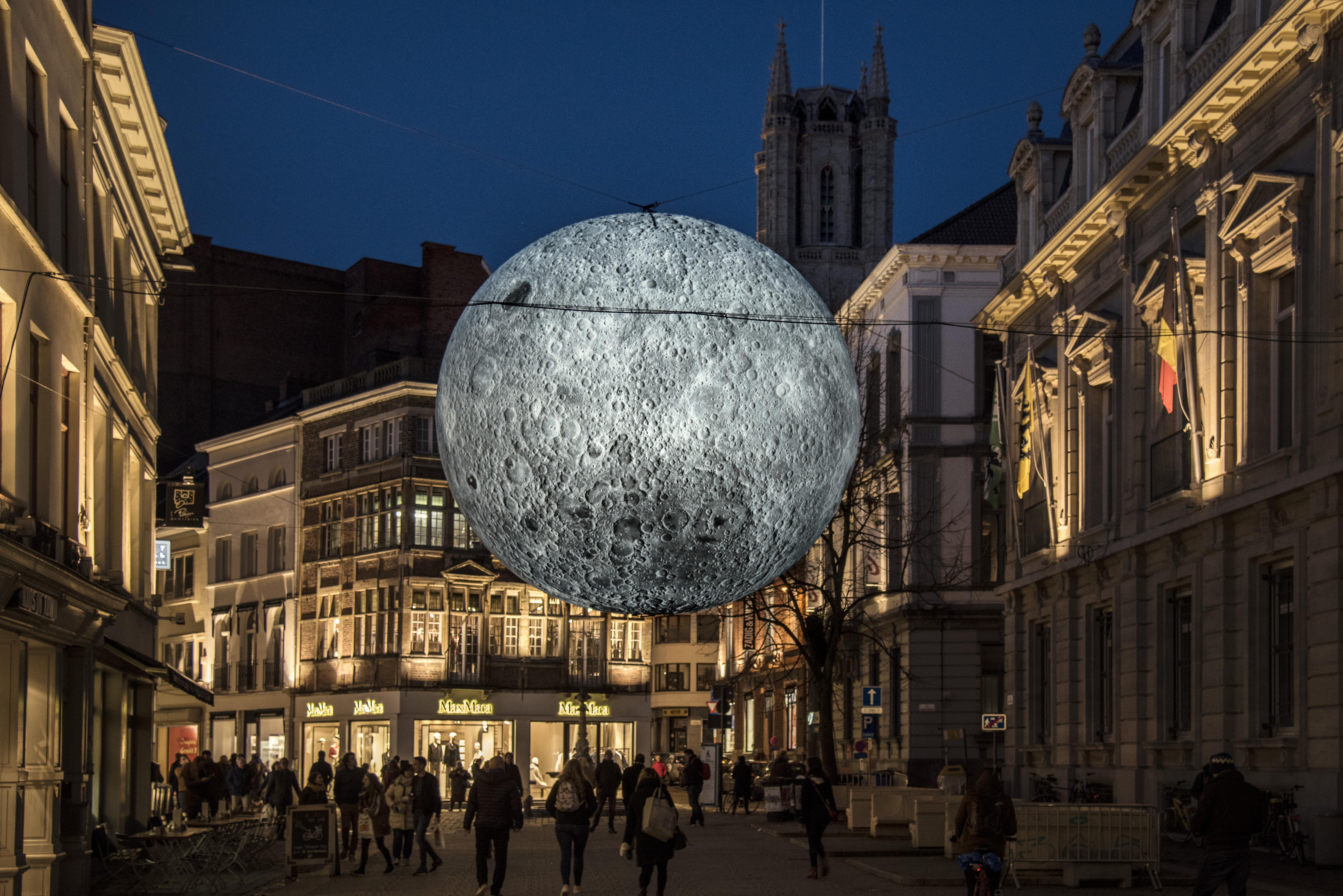 Gent - Lichtfestival 2018 - Museum of the Moon (by Luke Jerram).